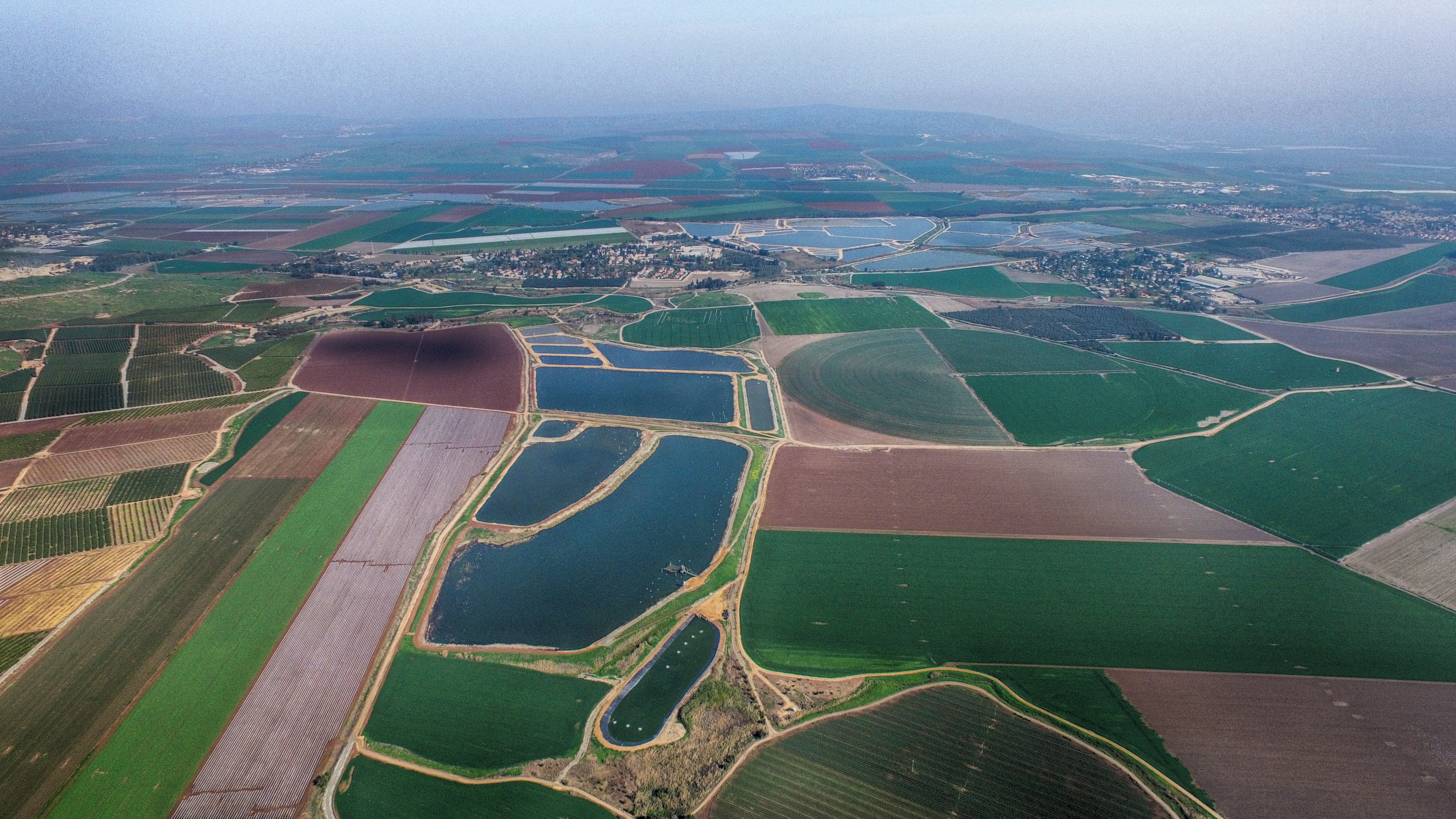 עמק יזרעאל מהגלבוע